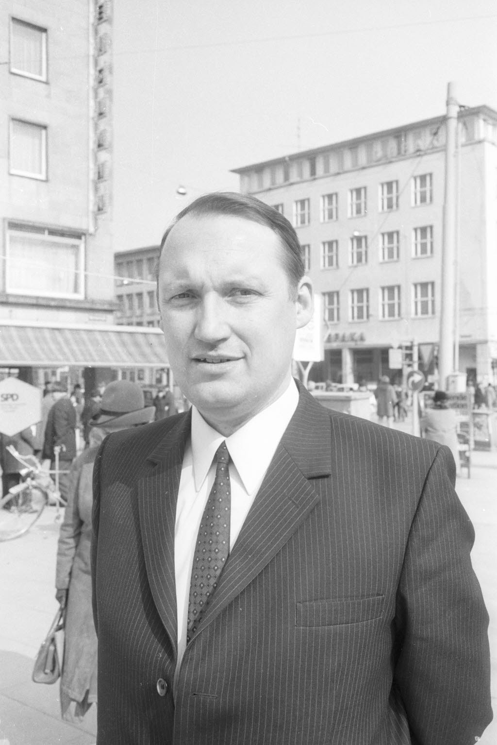 Bei der Eröffnung des Informationsstandes der SPD am Berliner Platz.